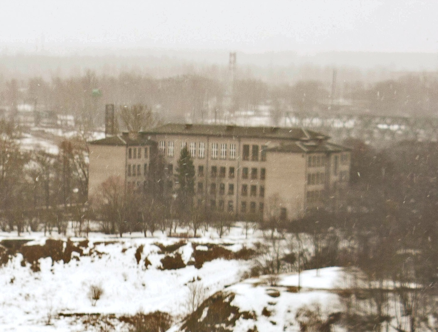 Endise Narva Juhkentali kooli hoone